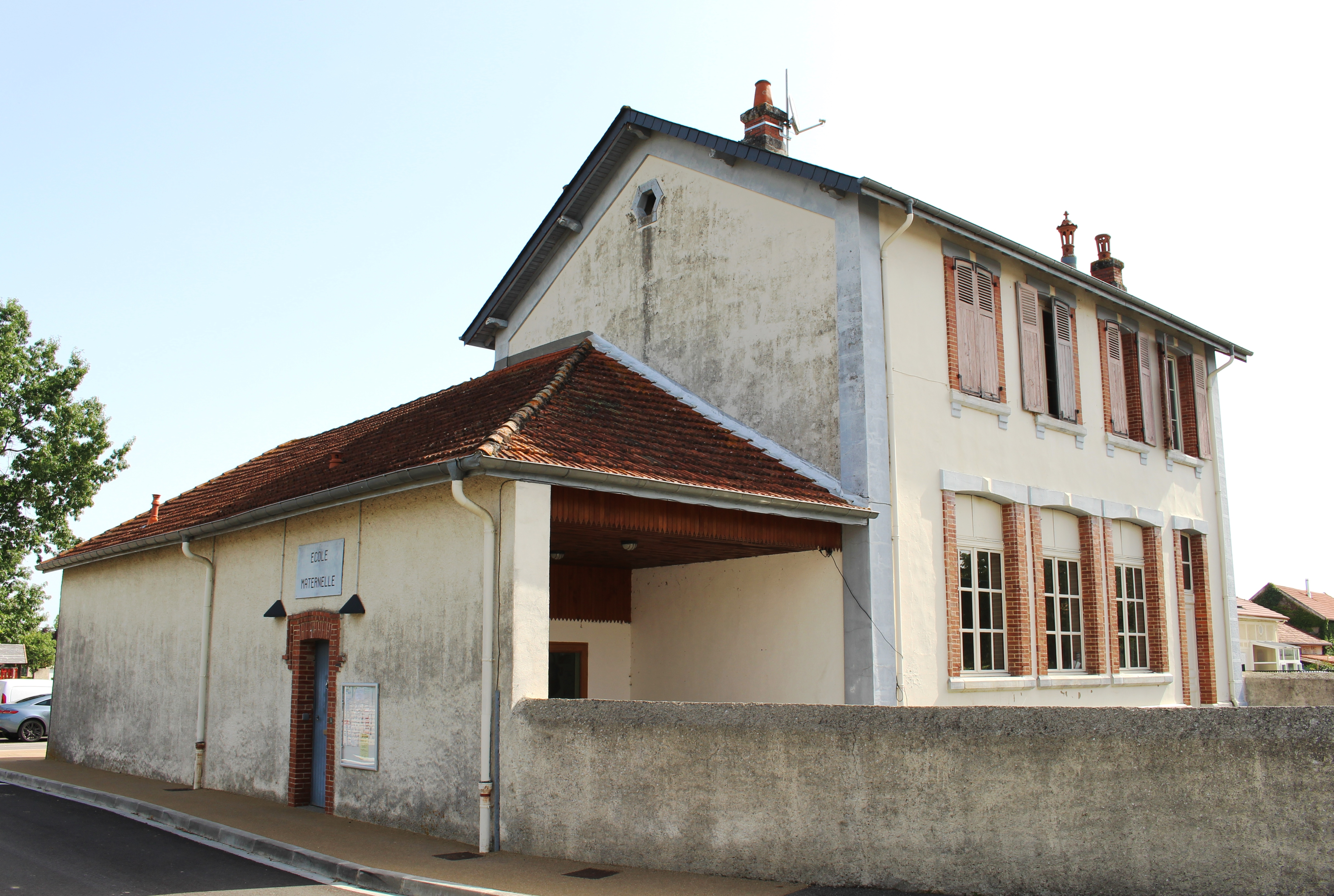 École de Siarrouy (Hautes-Pyrénées)